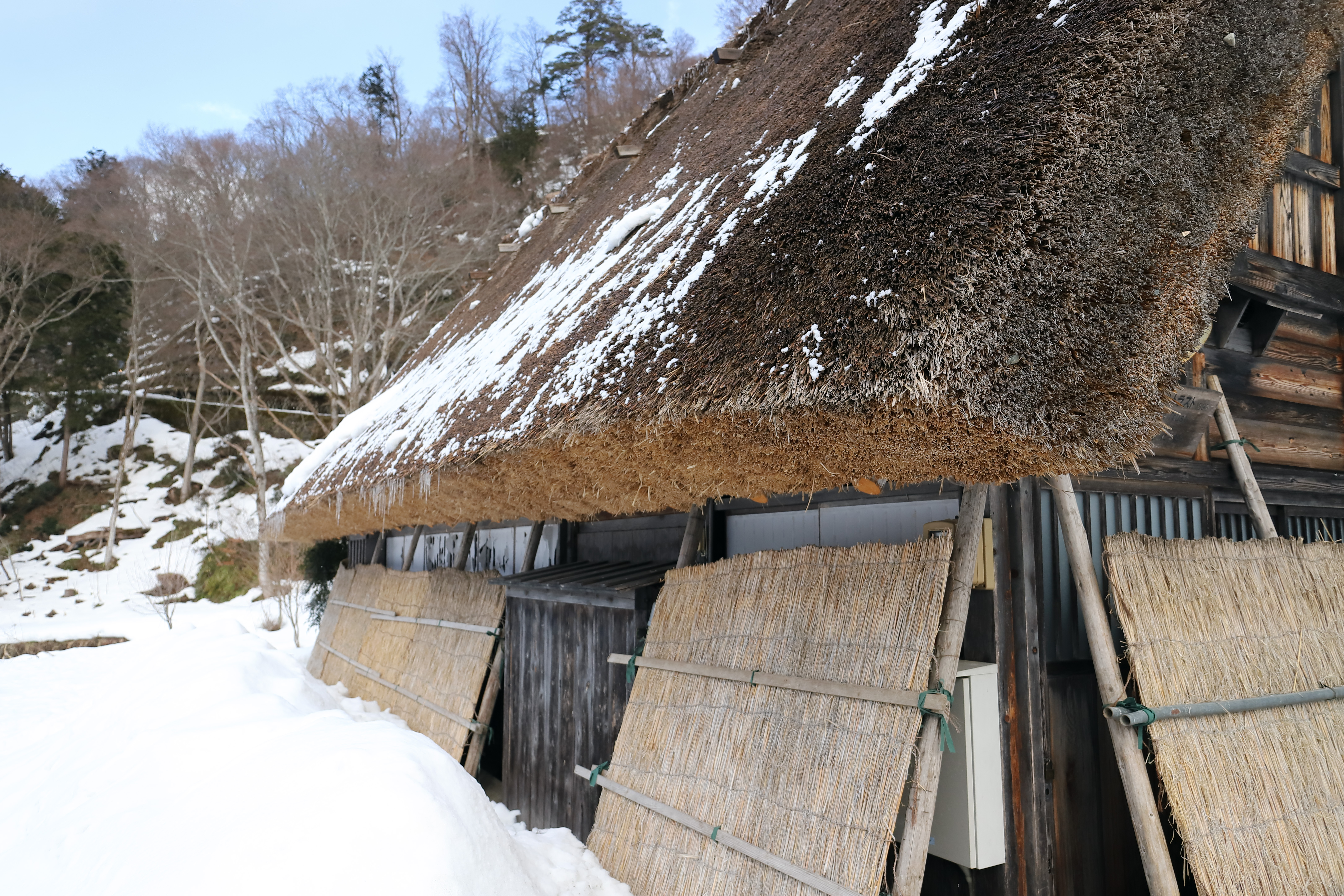 茅葺家屋に設置された雪囲い 白川郷にて撮影